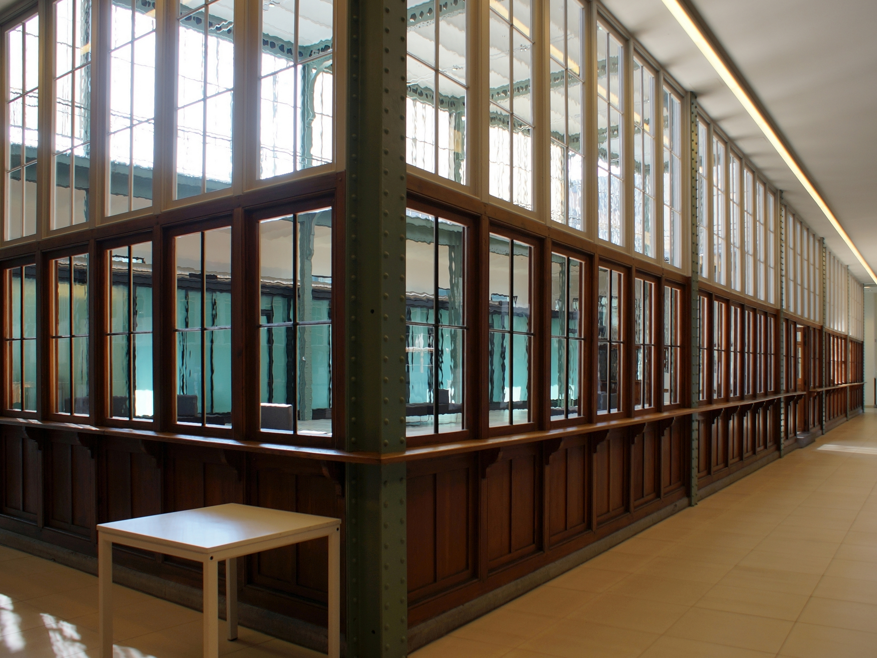 Antwerpen, Ledeganckkaai 7. Loketten van het voormalige goederenstation Antwerpen-Zuid (als station gesloten sinds 1988). Sedert 2004 is in dit gebouw de hoofdzetel van de Bank J. Van Breda & C° gevestigd.